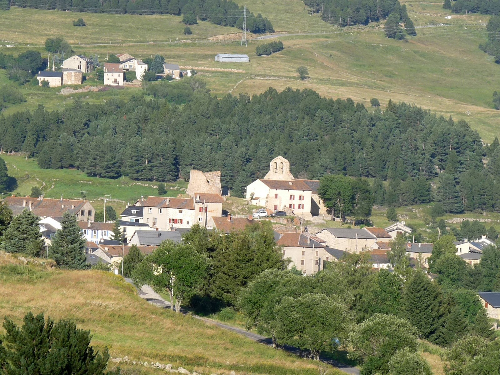 La Llagonne vue de l'ouest, Pyrénées-Orientales, France